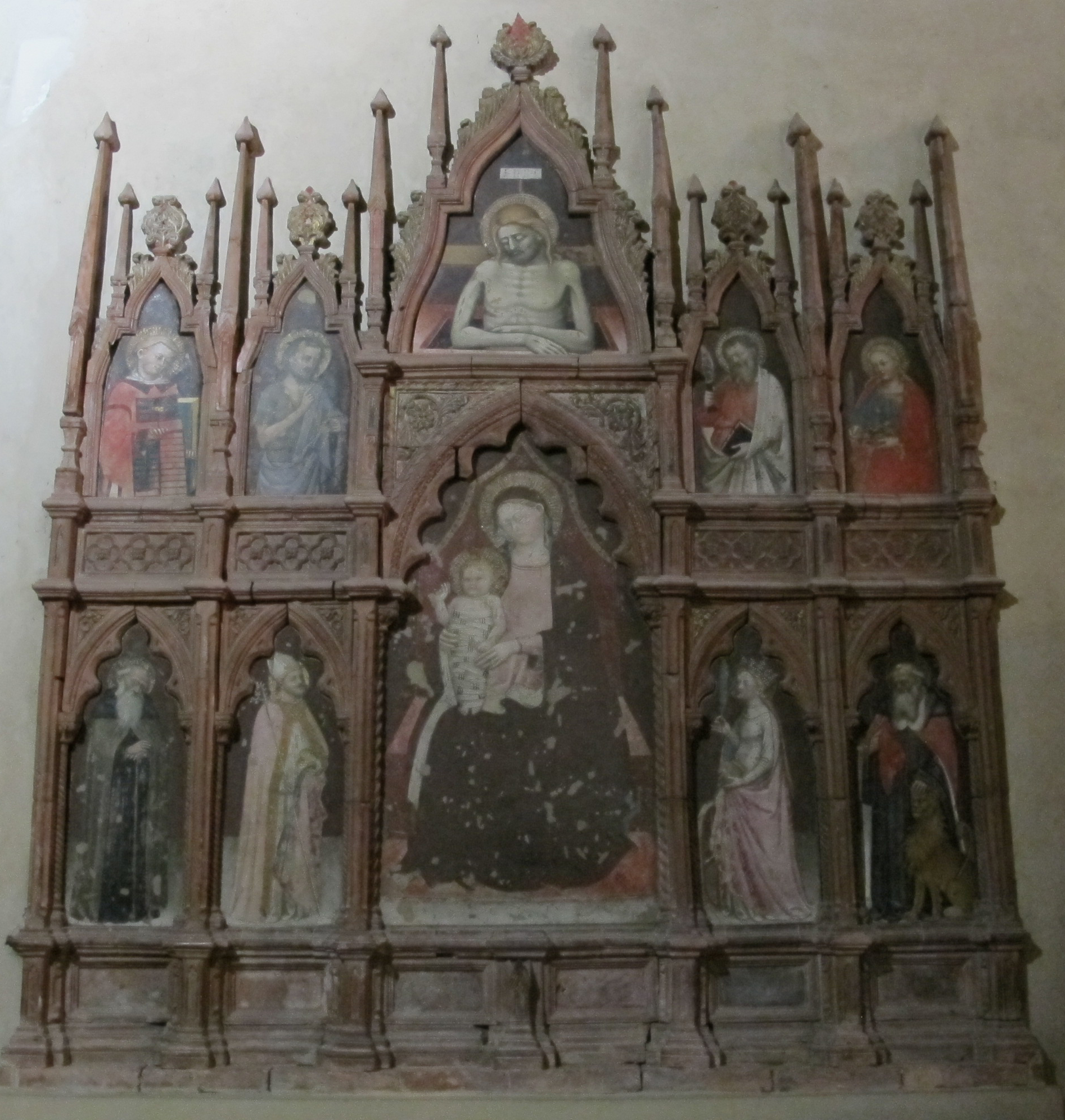 Santa Maria dei Servi, bo, interno, polittico di loppo di dalmasio